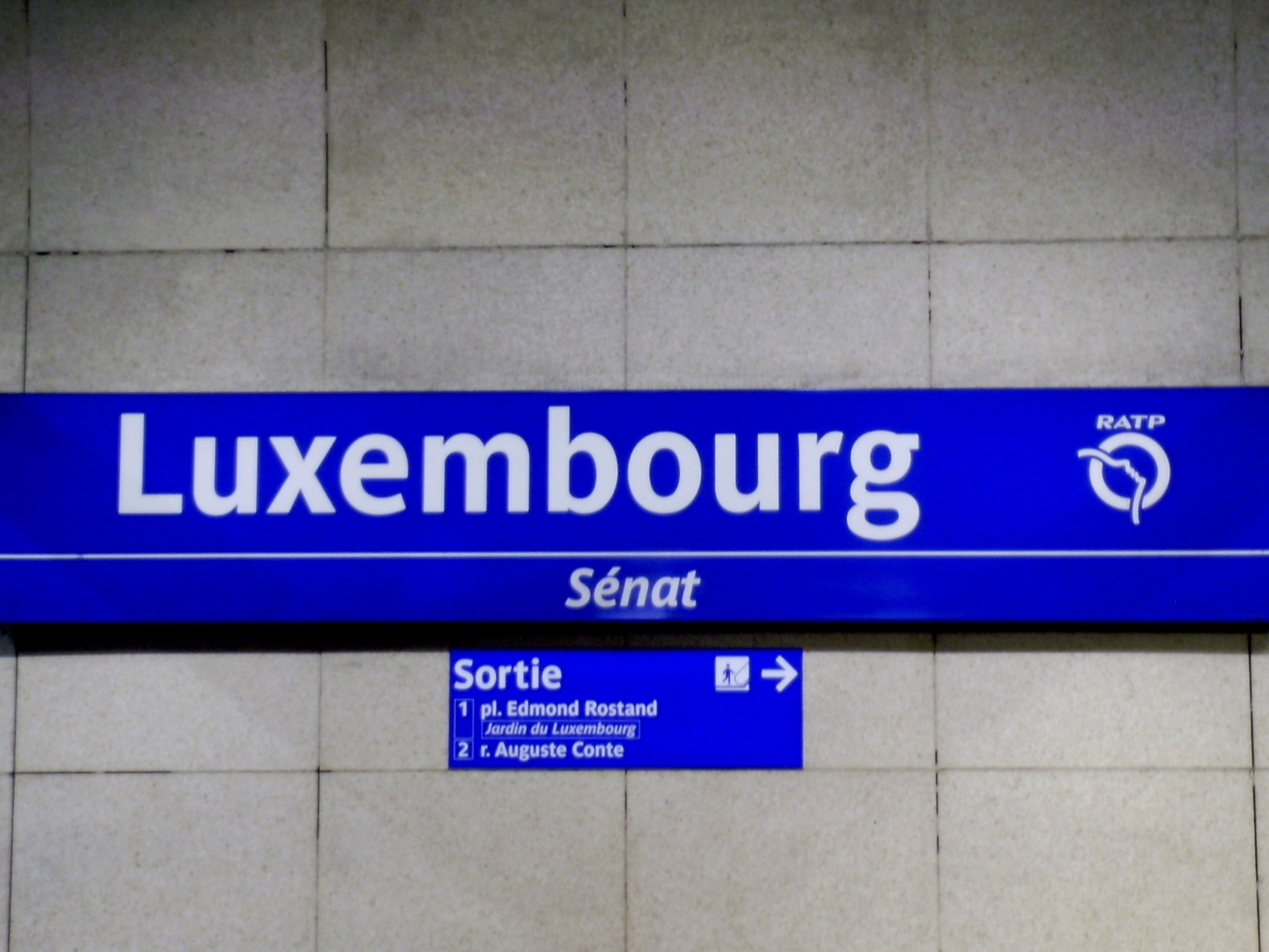 Gare du Luxembourg, à Paris (5e/6e arrondissement), France : panneau indiquant le nom de la gare.